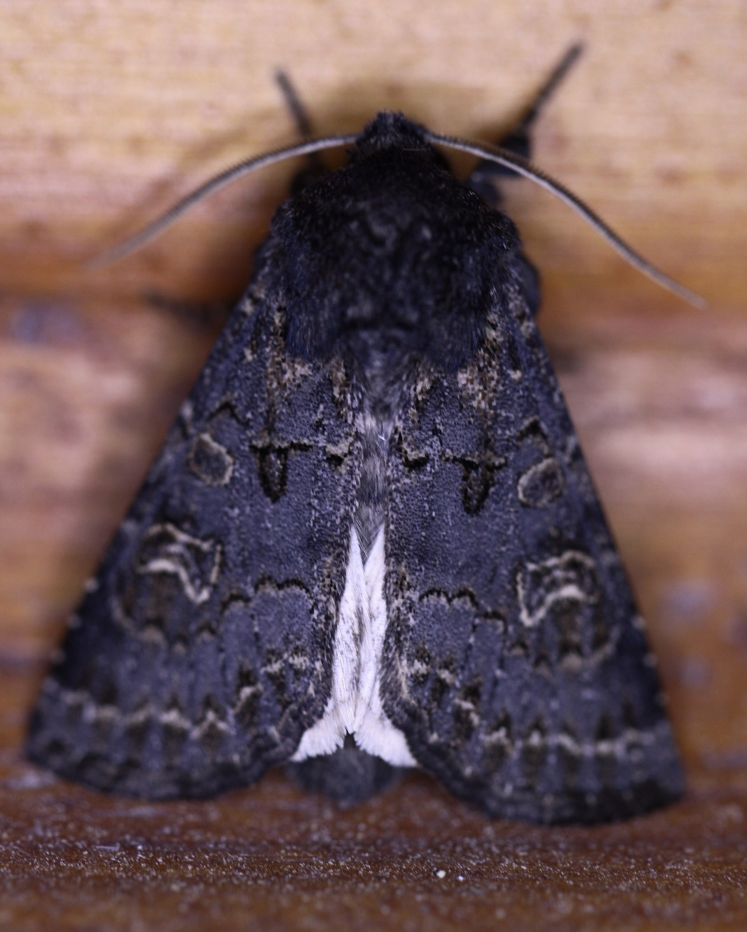 Tholera cespitis - Czech Republic, Písečná u Žamberka, noc